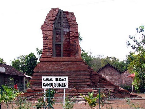 Sumur temple, Sidoarjo, East Java, Indonesia